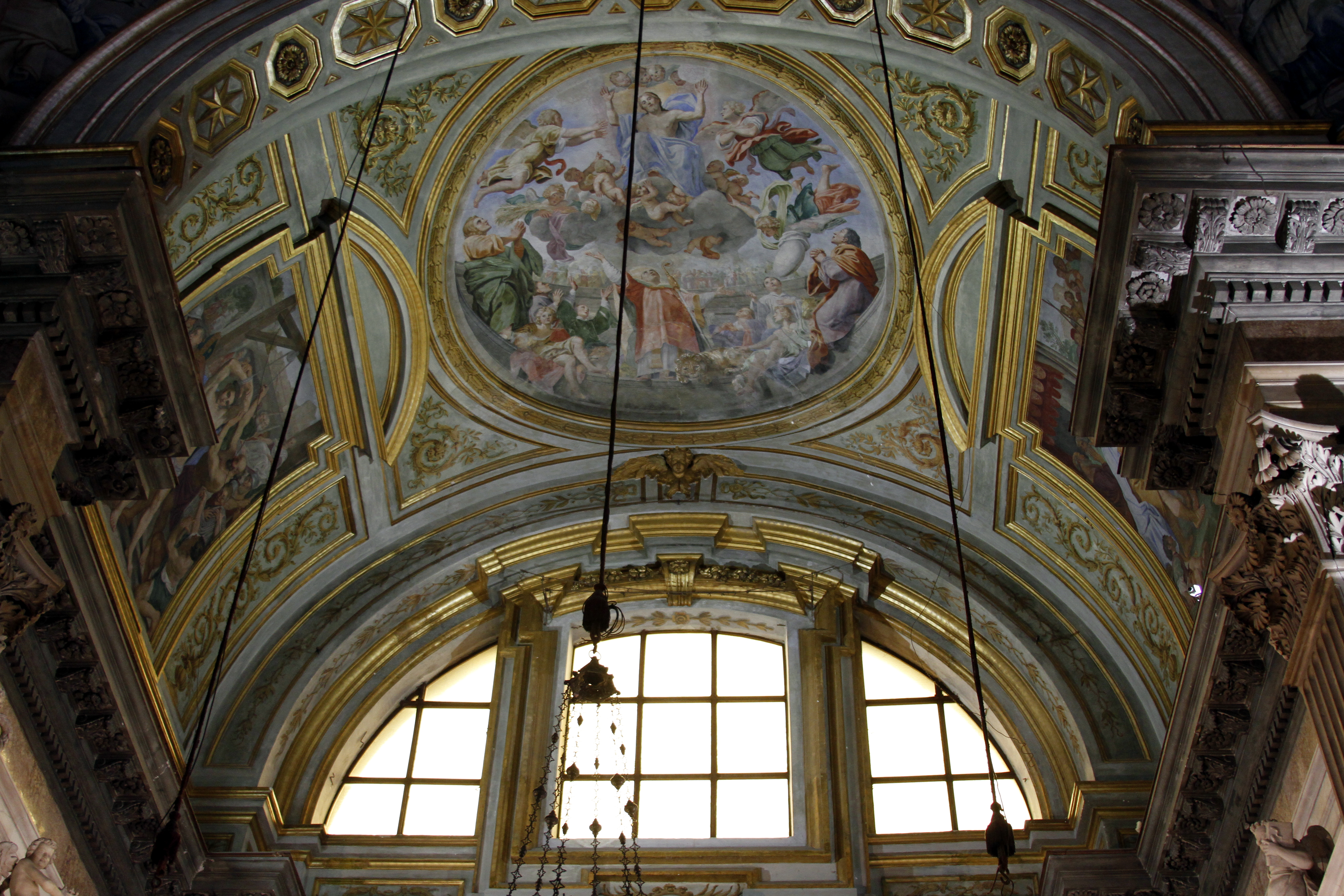 Cappella di San Gennaro, Catedral de Nápoles